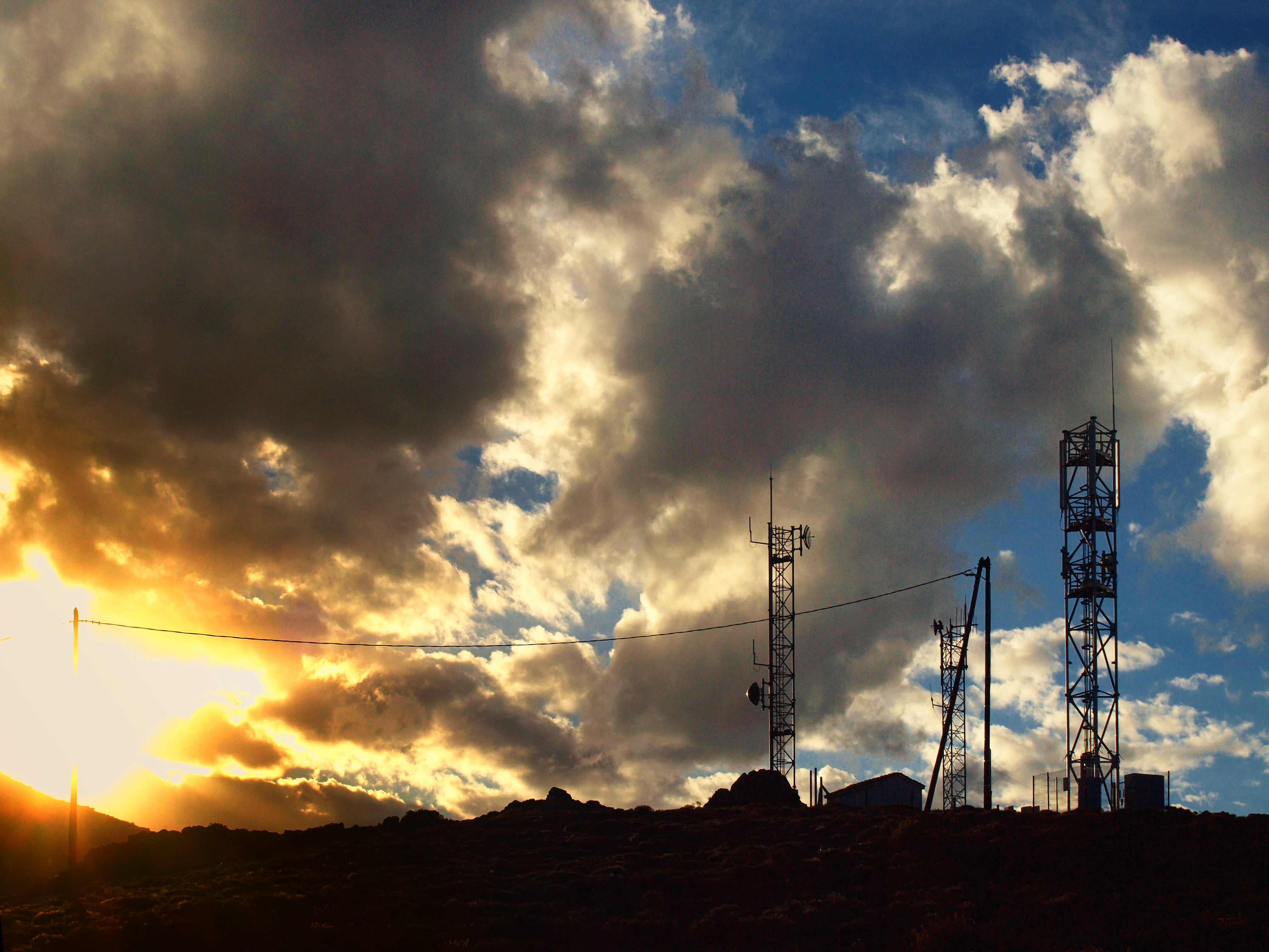 Bigorno (Corsica) - Col de Bigorno (885 m) sur la route D5